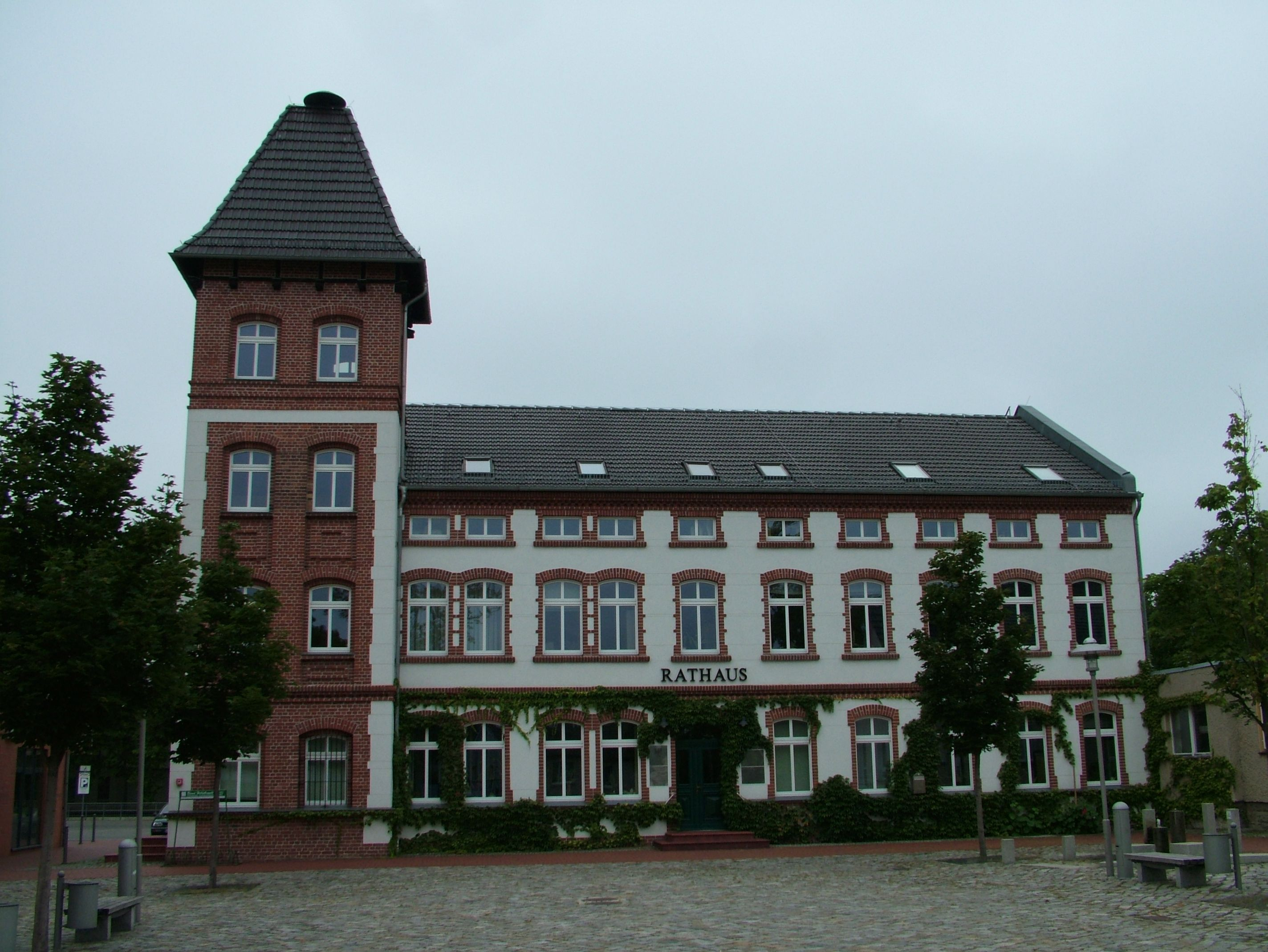 Woltersdorf bei Berlin, das Rathaus